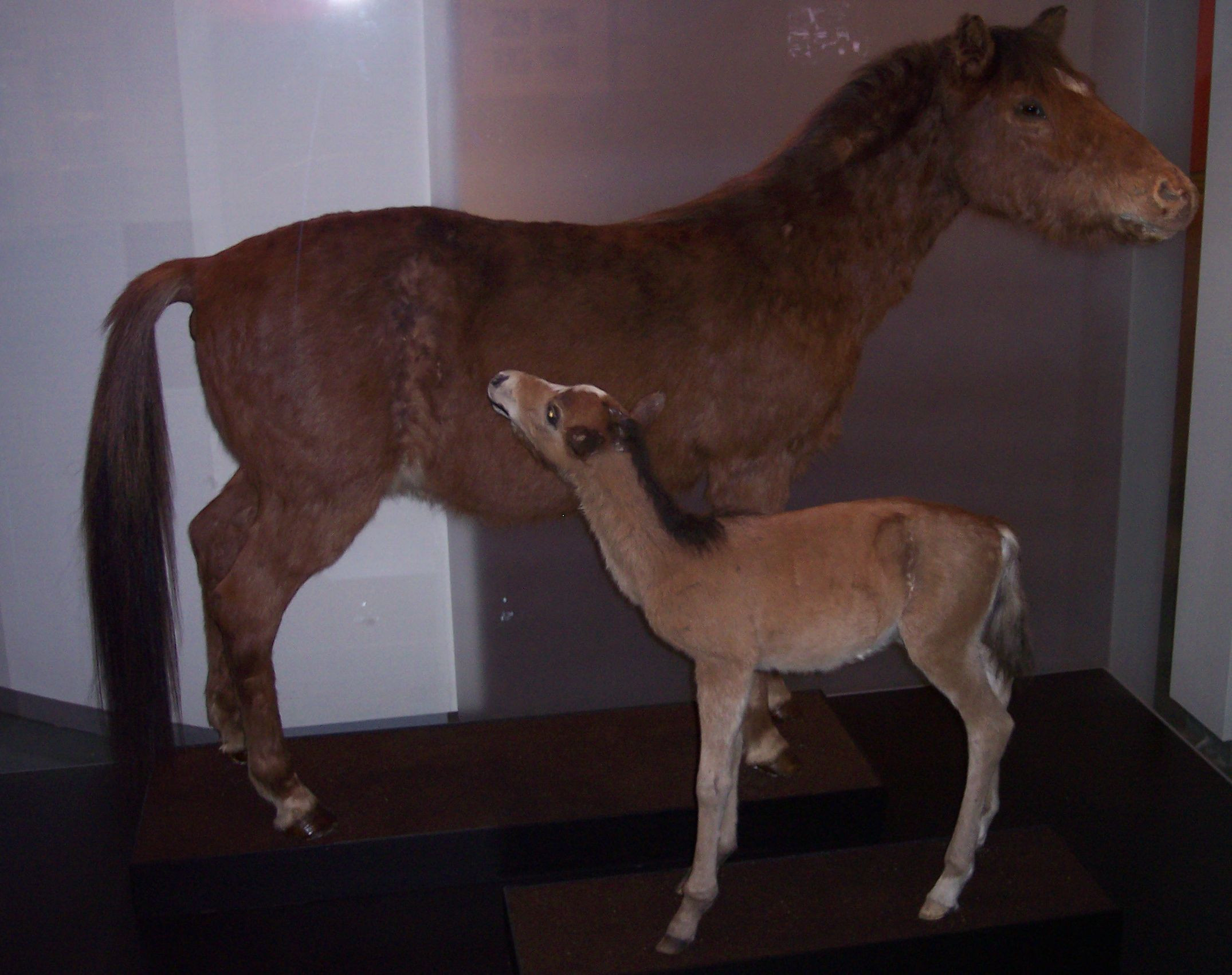 Emscherbruch Wildpferd